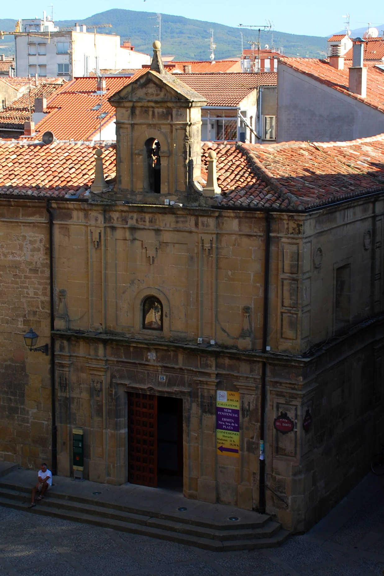 Ermita de la Virgen de ls Plaza en Santo Domingo de la Calzada (La Rioja - España)